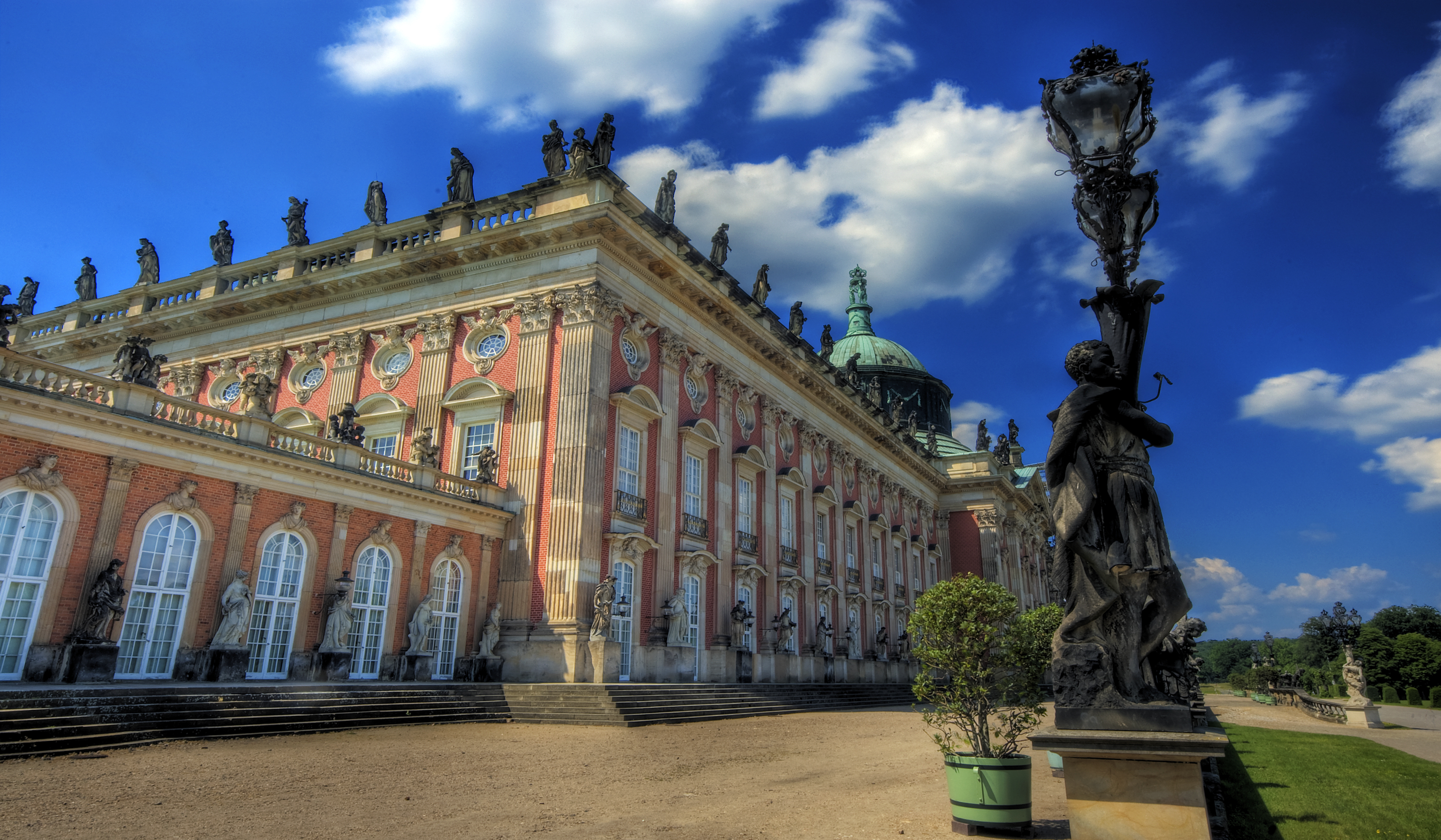 Das Neue Palais ist ein Schloss an der Westseite des Parks Sanssouci in Potsdam. Der Bau wurde 1763 nach Beendigung des Siebenjährigen Krieges unter Friedrich dem Großen begonnen und bereits 1769 fertiggestellt. Es gilt als letzte bedeutende Schlossanlage des preußischen Barocks. Friedrich plante es nicht als Residenz für sich - als solche diente es erst im Deutschen Kaiserreich (1871-1918) -, sondern als Schloss für Gäste seines Hofes.